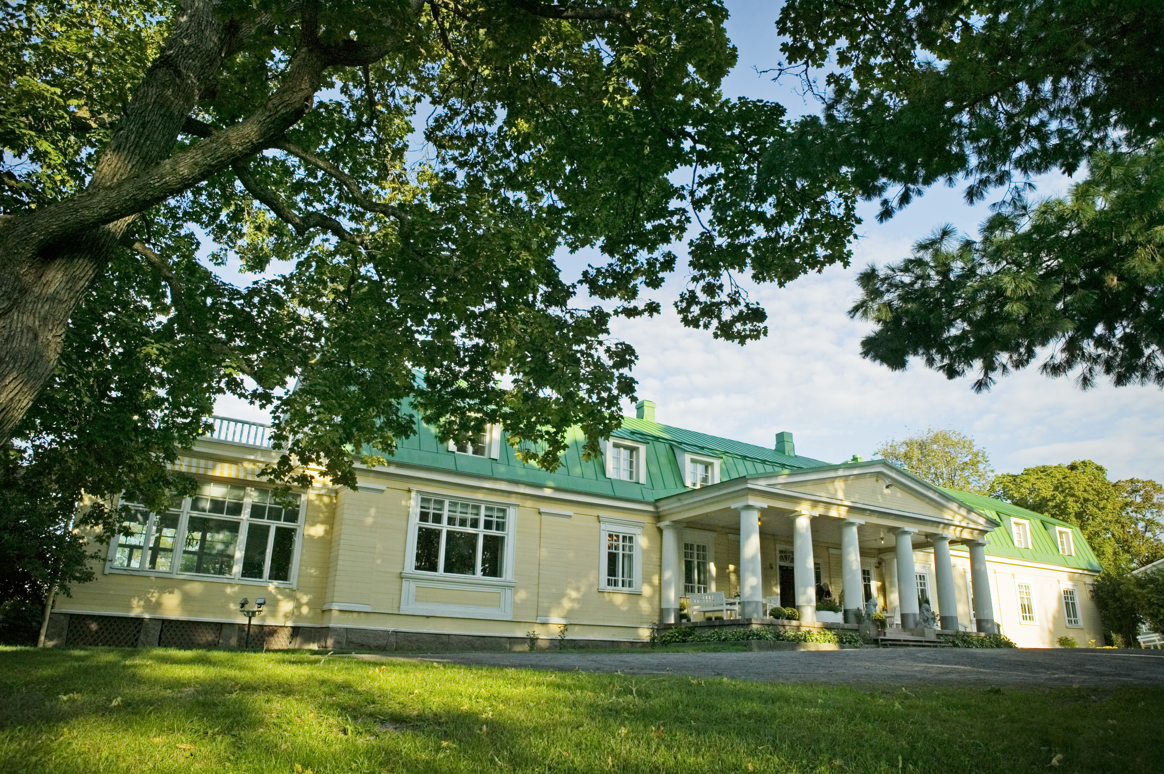 Kartanokylpyla Kaisankoti